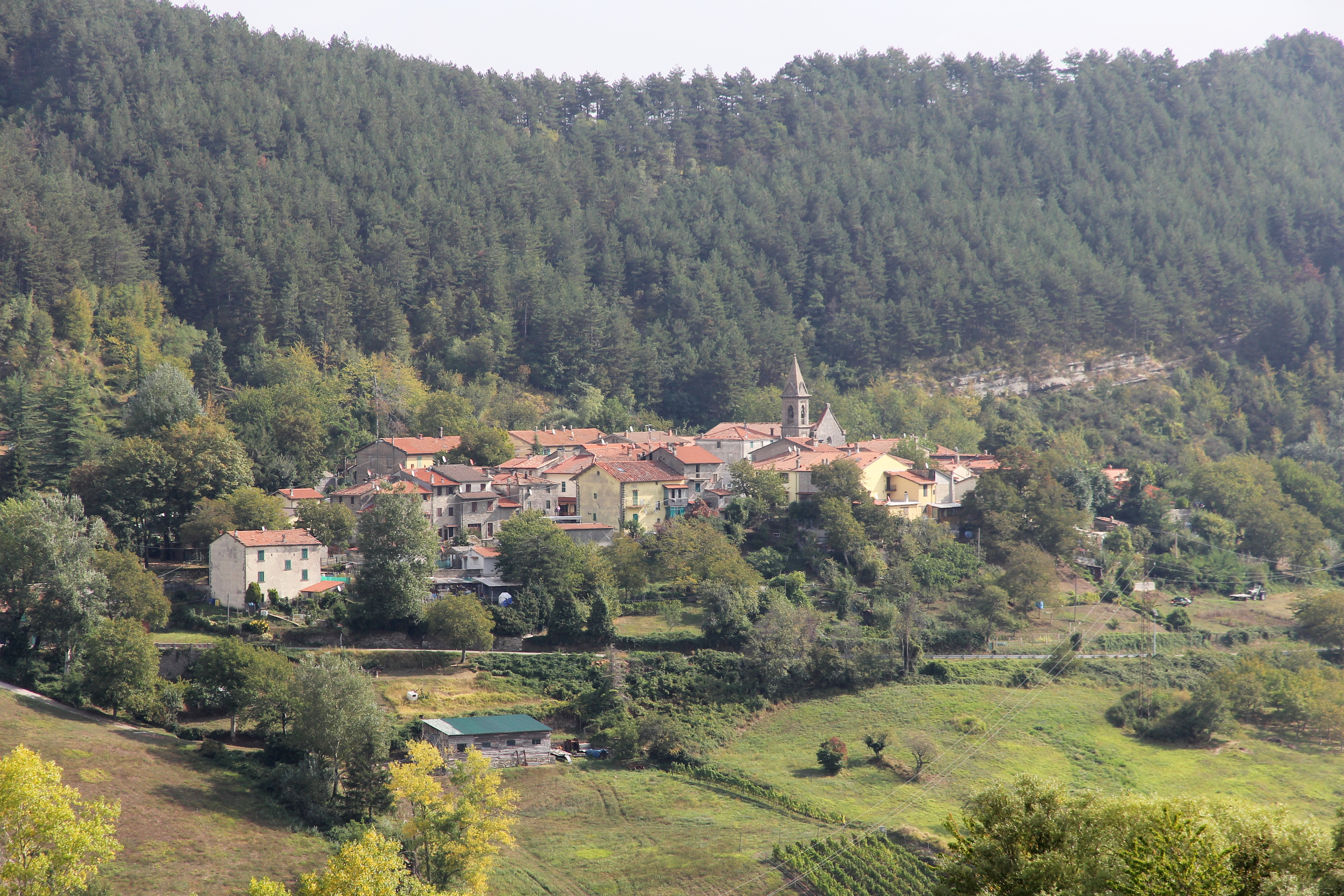 Borgo San Lorenzo, frazione Casaglia, panorama